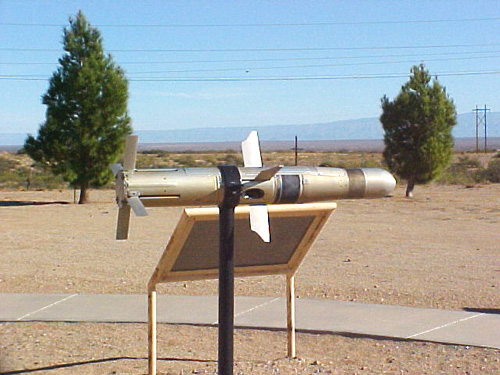 An anti-tank missile.